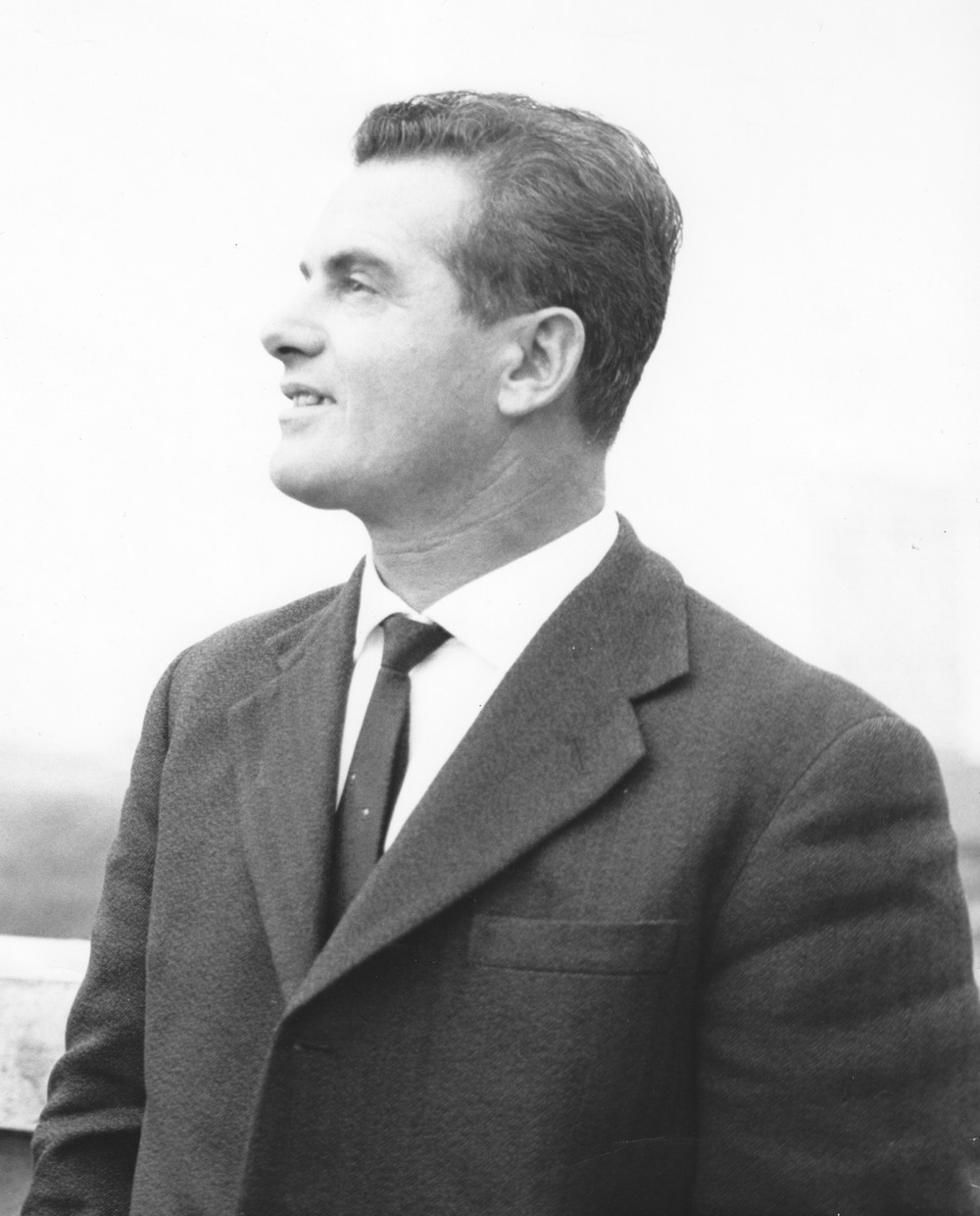 Ritratto del sindacalista Giuseppe Sacchi negli anni Sessanta.